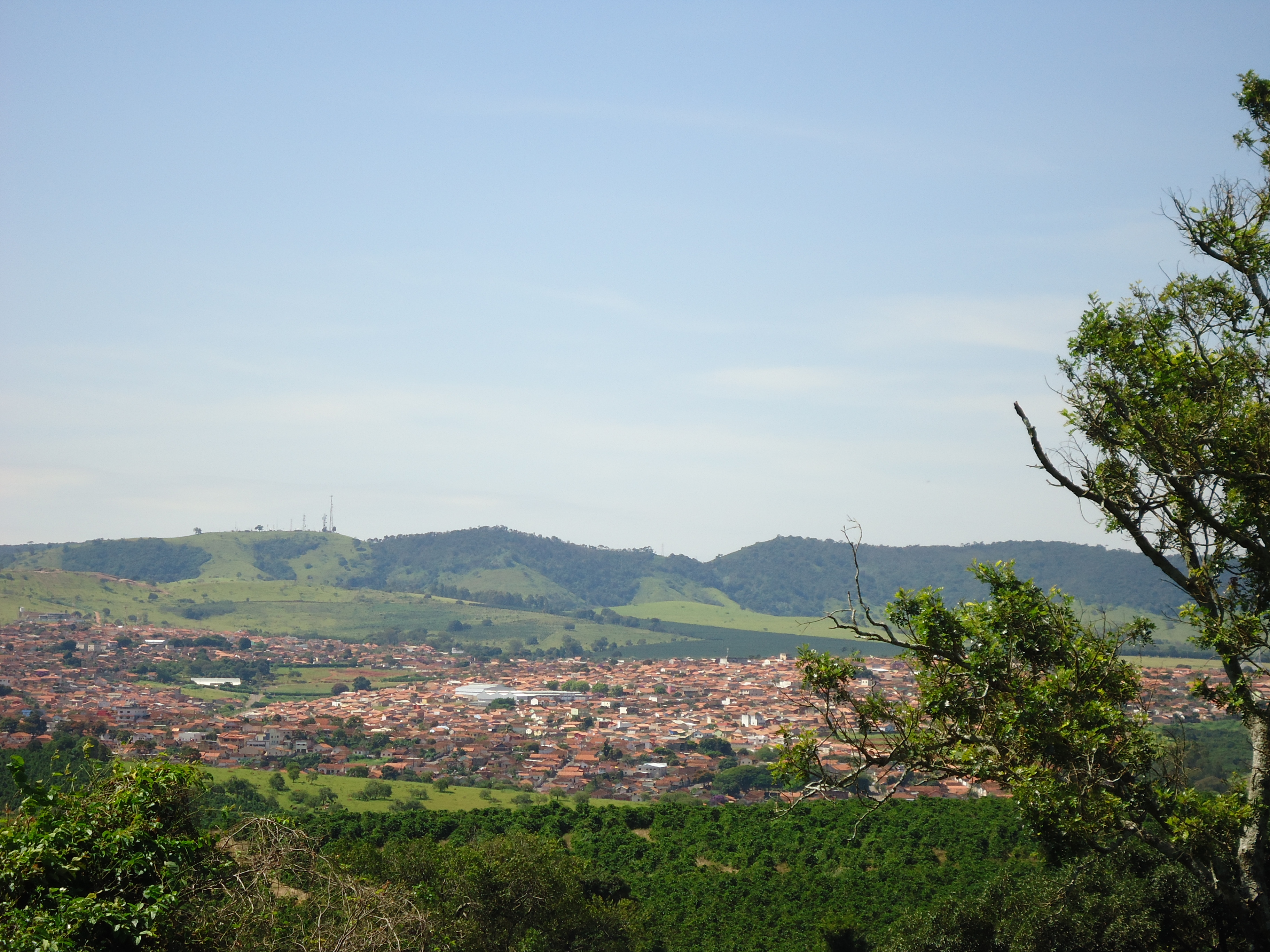 Vista da cidade e da serra que ultrapassa mil metros de altitude em relação ao nível do mar.